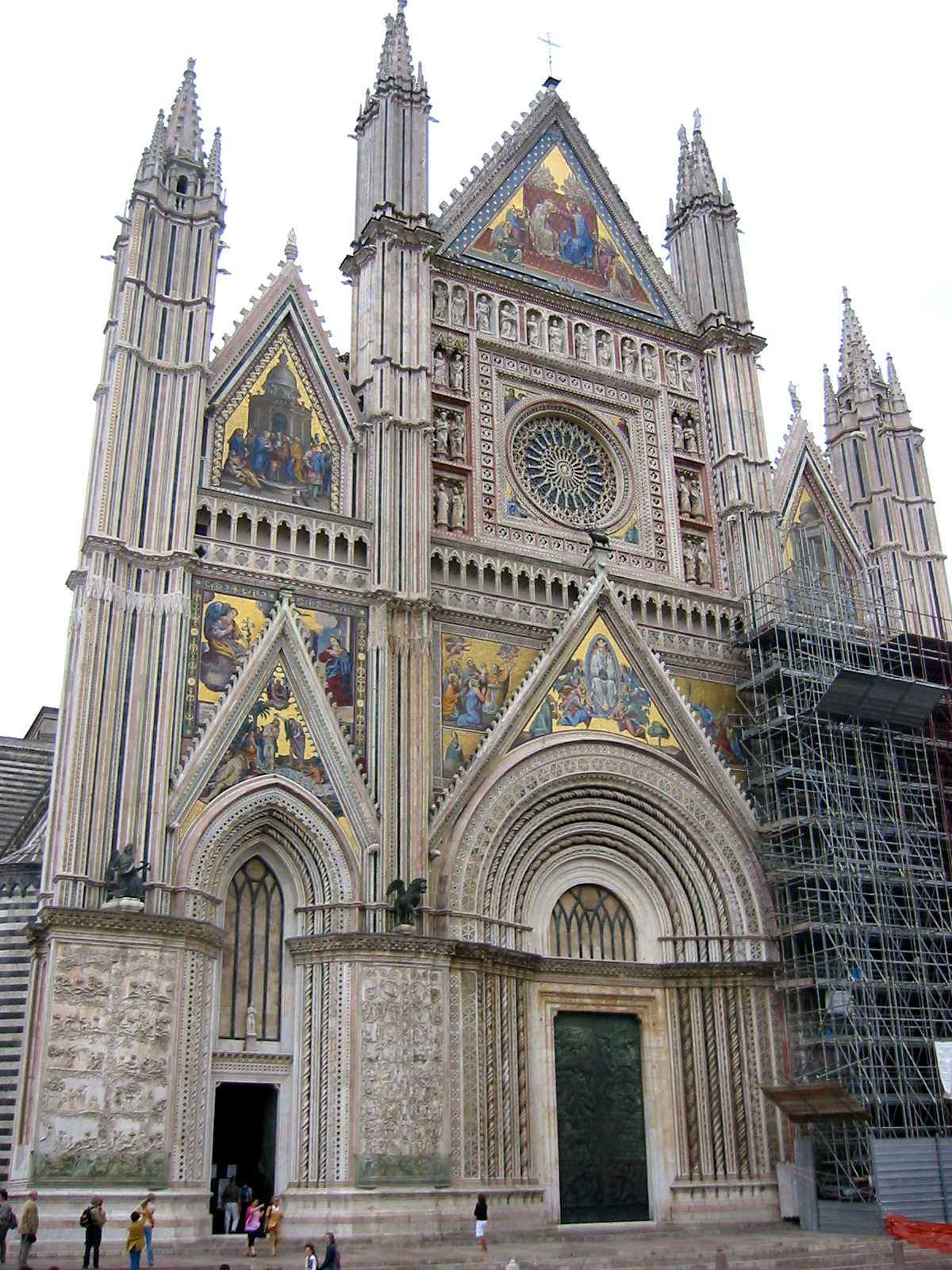 Domfassade des Doms von Orvieto